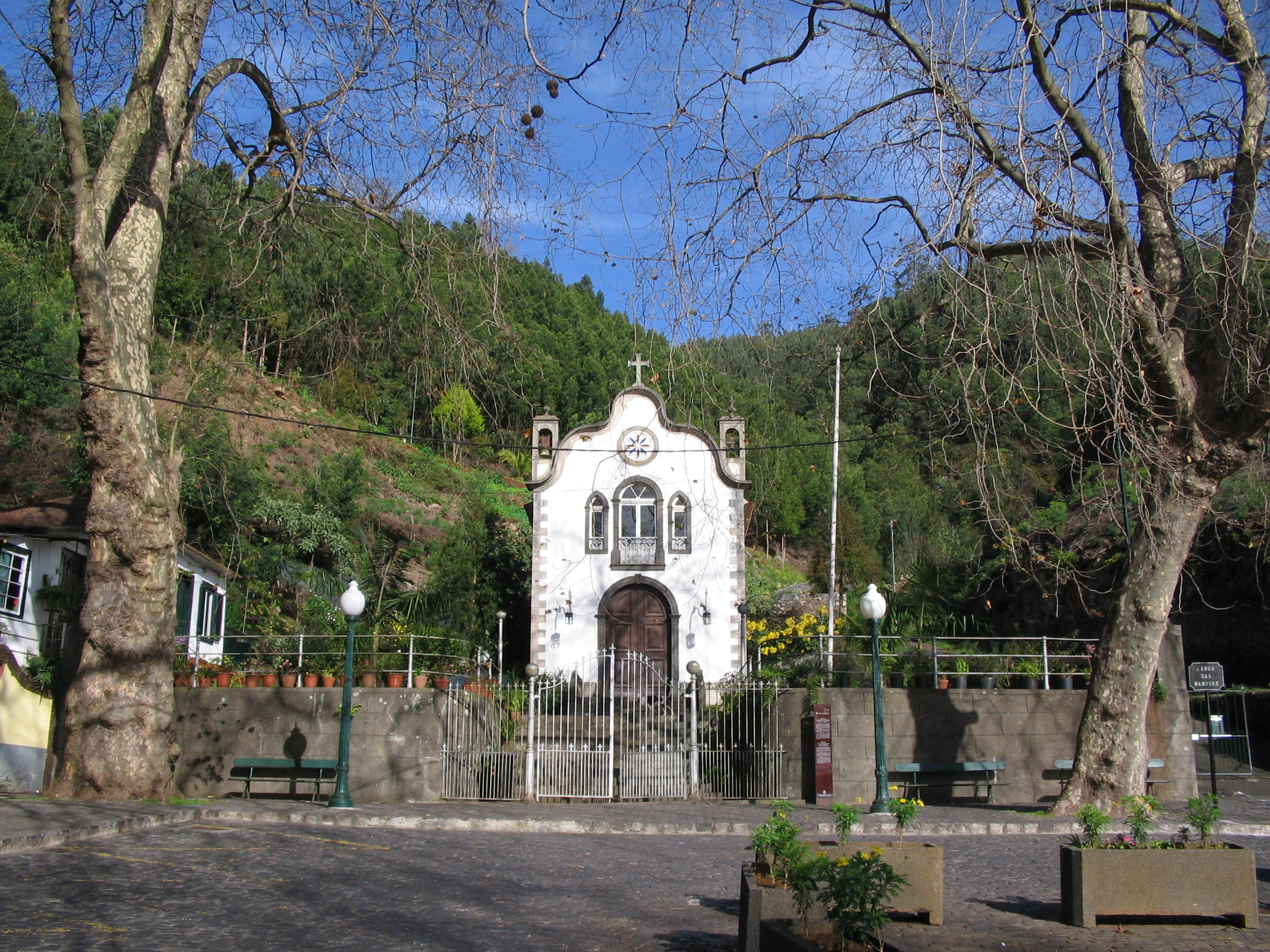 A Szeplőtelen fogantatás kápolnája (Madeira, Monte)